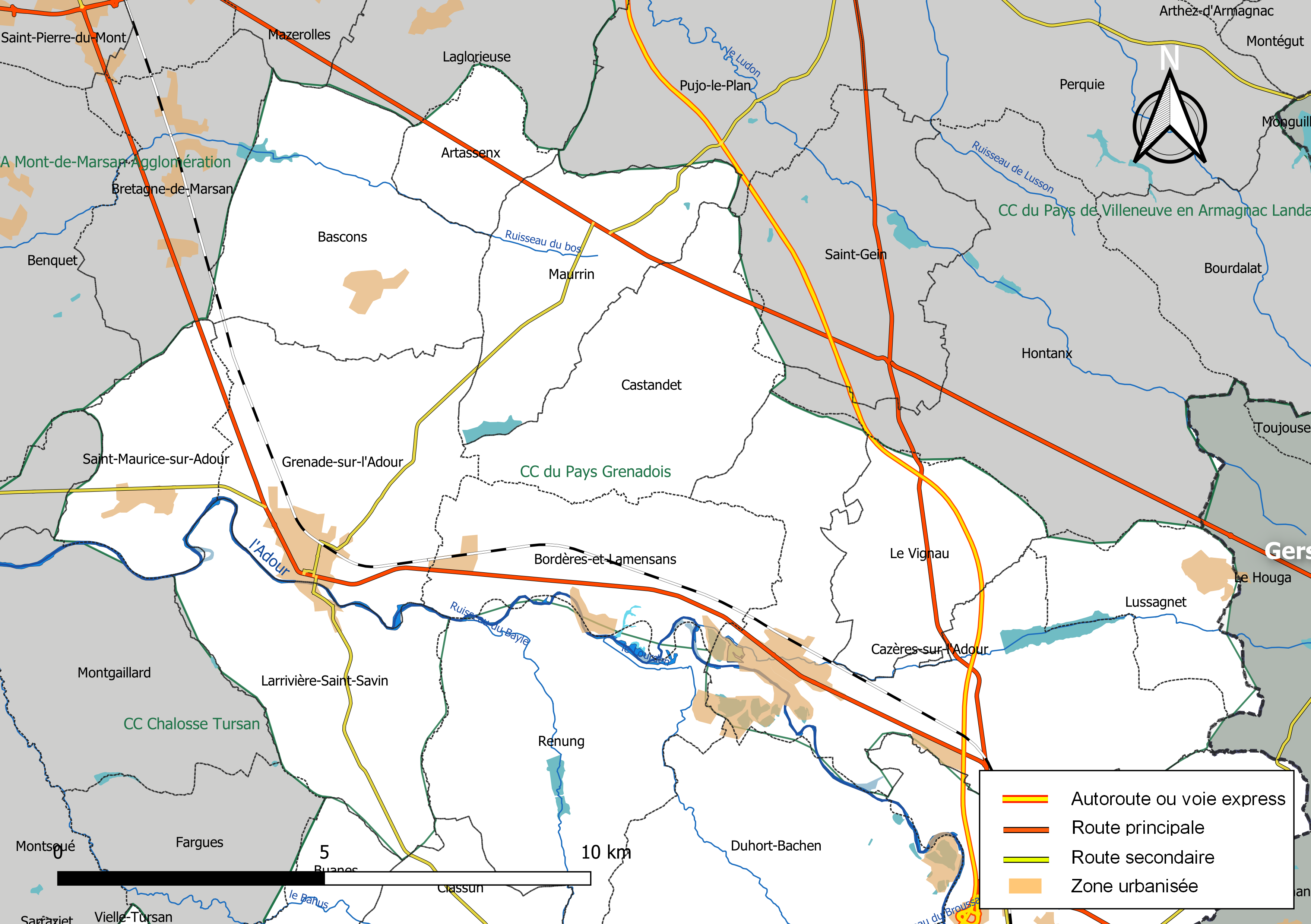 Carte géographique de la Communauté de communes du Pays grenadois, département des Landes, France. Composition au 1er janvier 2019.